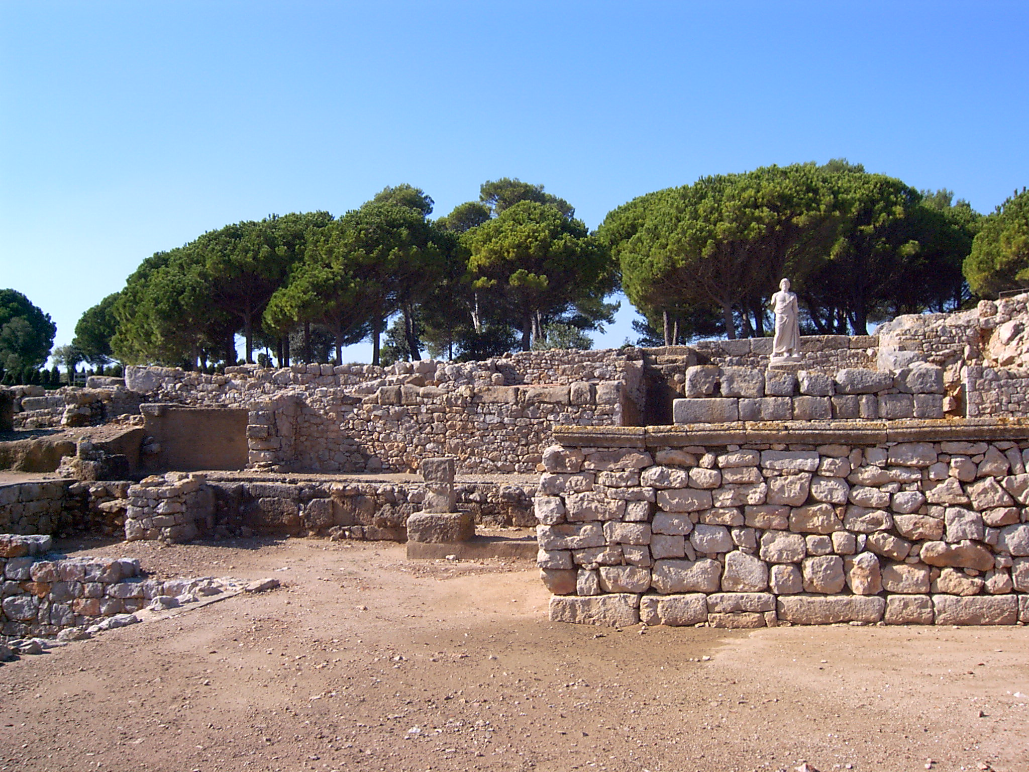 Restos de la parte griega de la ciudad antigua Ampuries